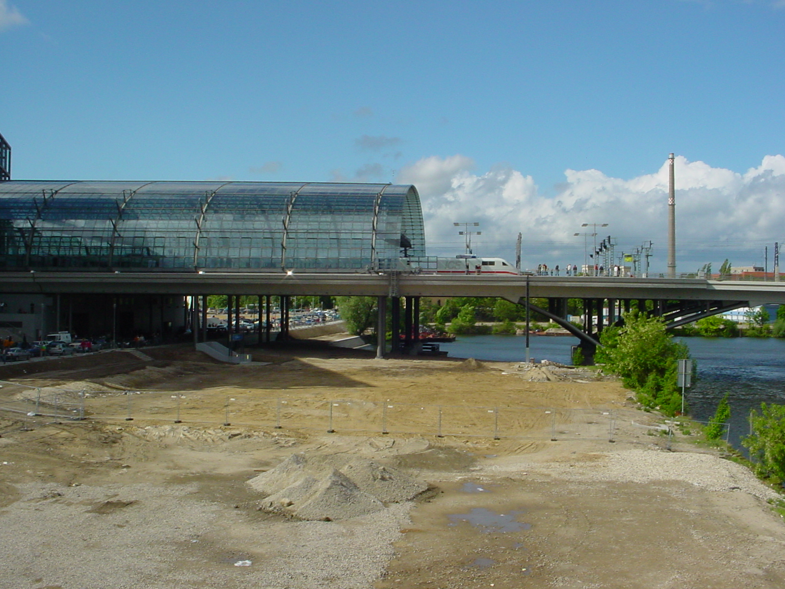 Berlin Hauptbahnhof